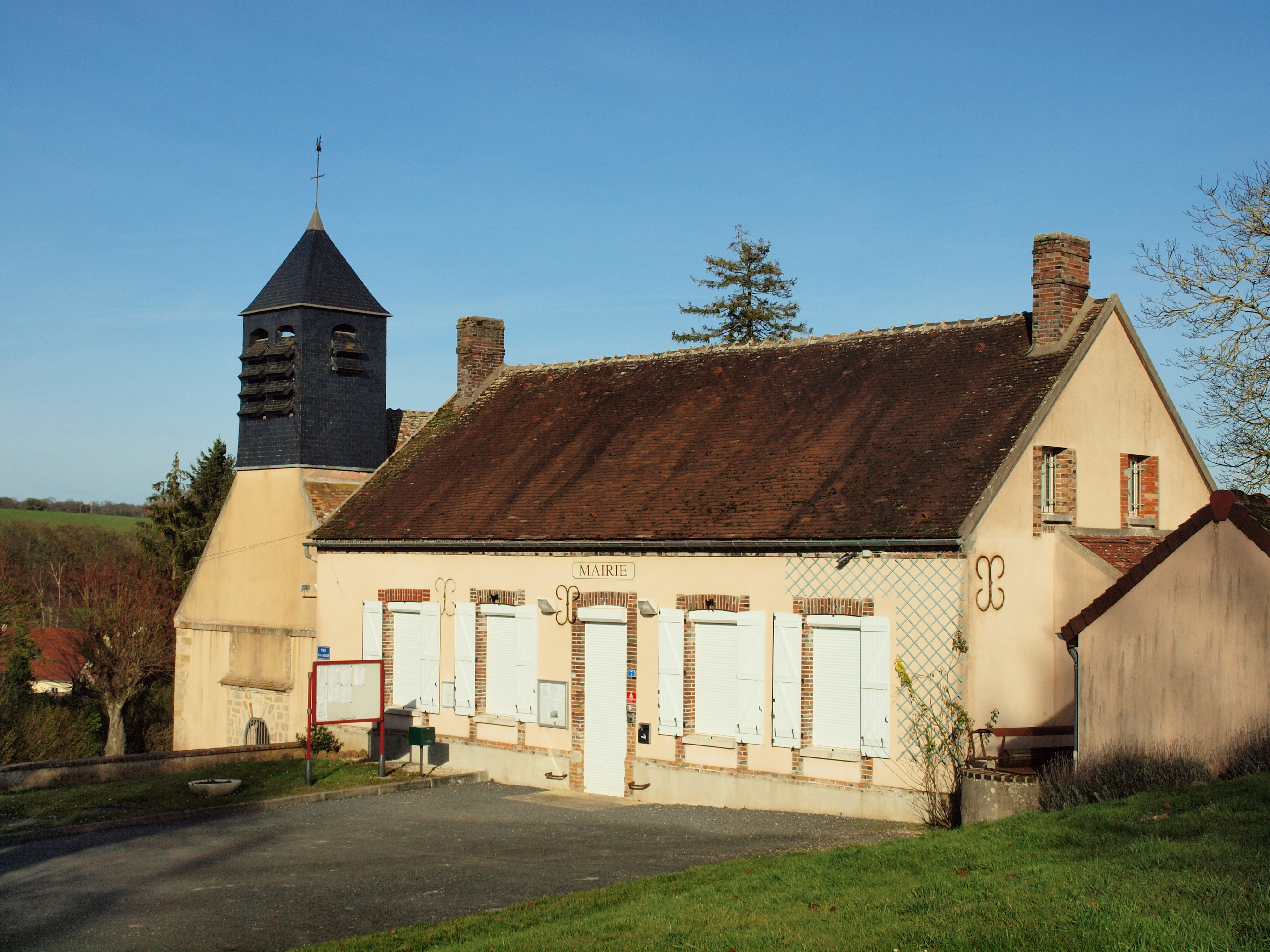 Mairie de Subligny (Yonne, France)